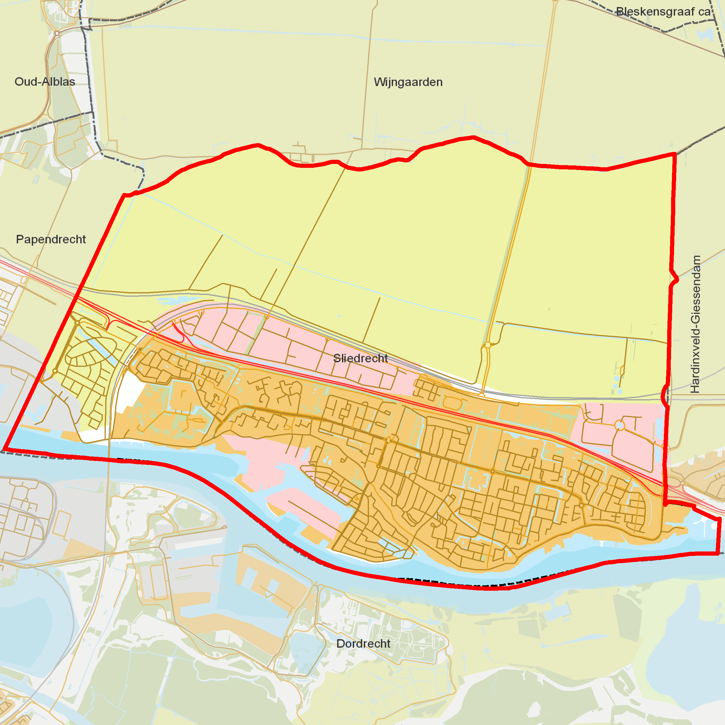 BAG woonplaatsen - Gemeente Sliedrecht.png